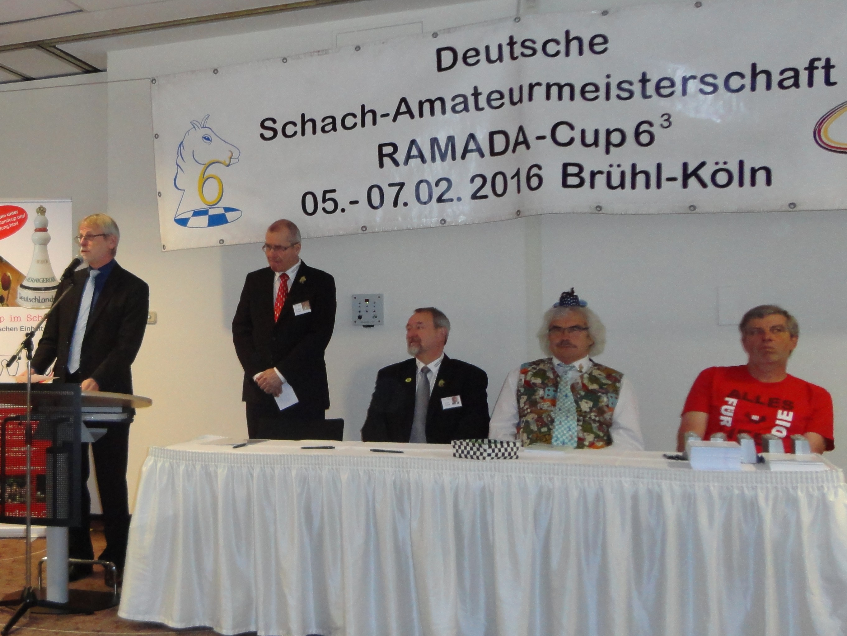 Bürgermeister Dieter Freytag begrüßt die Teilnehmer der 15. Deutschen Schach-Amateurmeisterschaft 2015/2016 in Brühl bei Köln.